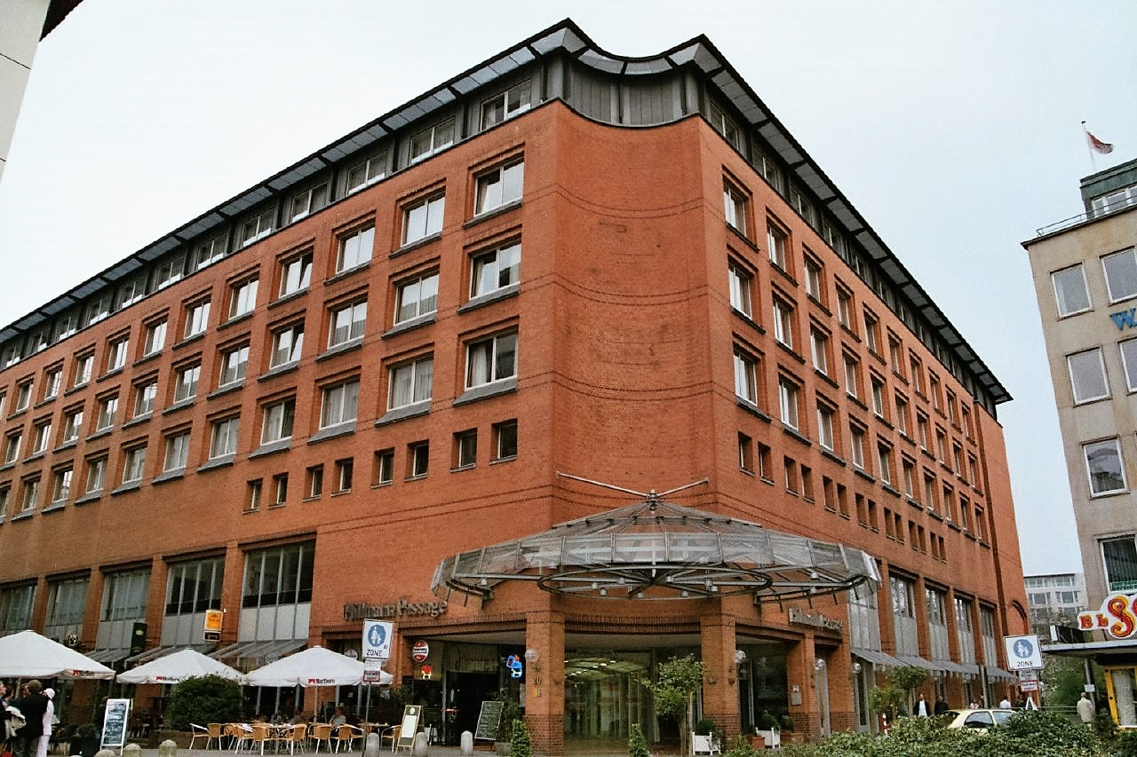 Hotel am Hillmannplatz in Bremen, Deutschland. Ansicht vom Hillmannplatz, mit dem Haupteingang des Hotels. Bemerkung: Aufnahme aus dem Jahr 2005. Damals war das vormalige Marriott-Hotel bereits geschlossen (Schließung um 2003), während die Hillmann-Passage noch in Betrieb war.